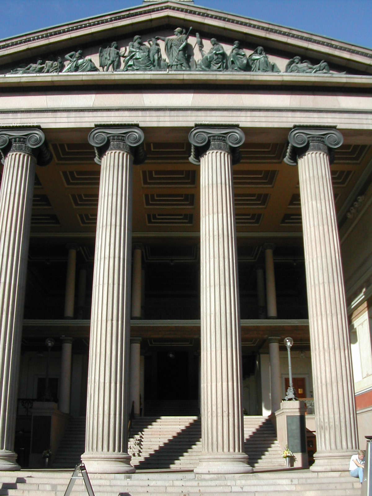 Midtbygningen, Universitetet i Oslo (Karl Johan)